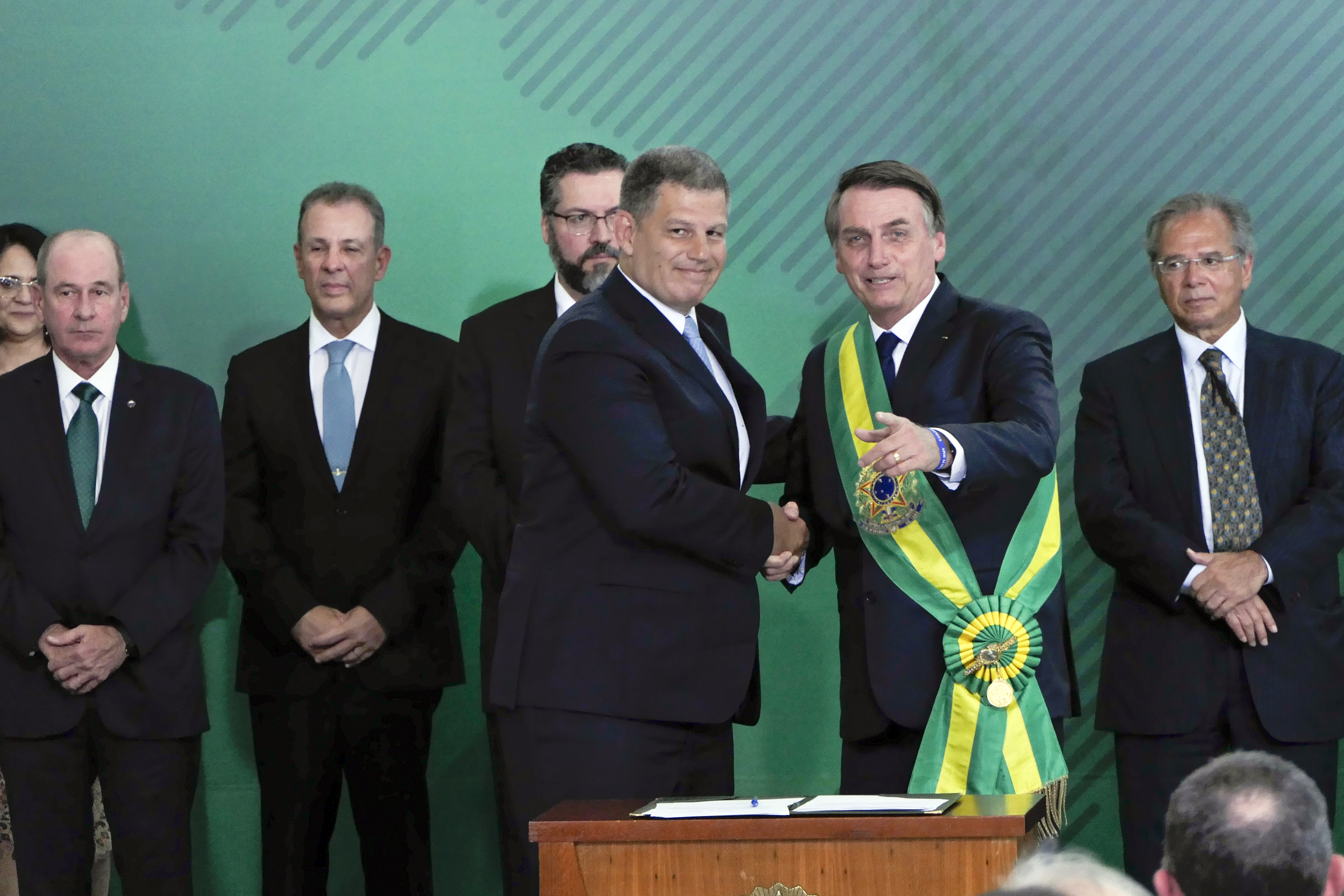 O presidente Jair Bolsonaro dá posse à equipe ministerial no Palácio do Planalto. Participam: presidente da República, Jair Bolsonaro ministro da Secretaria-Geral da Presidência, Gustavo Bebianno. Foto: Roque de Sá/Agência Senado